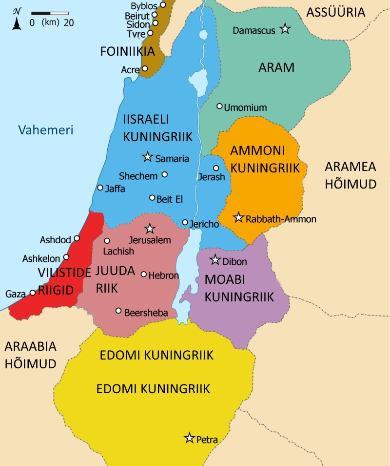 Riigid Levanti piirkonnas, 830 eKr